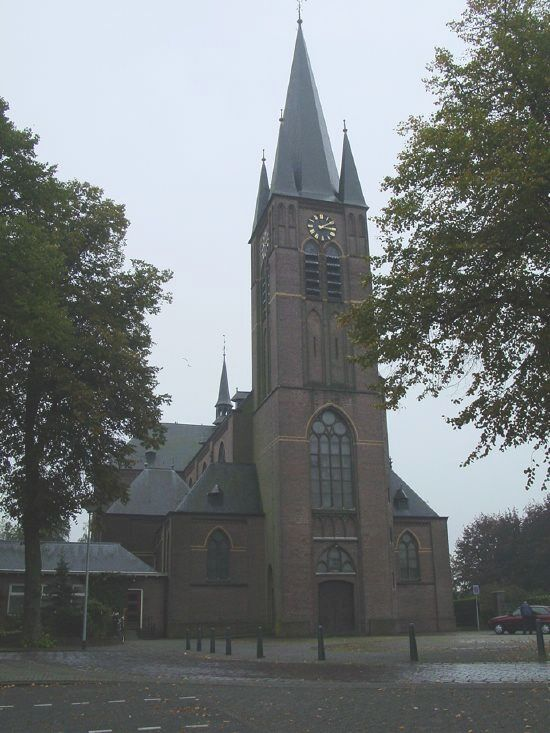 Rooms-katholieke Sint-Willibrorduskerk aan het Kerkplein te Zeilberg.